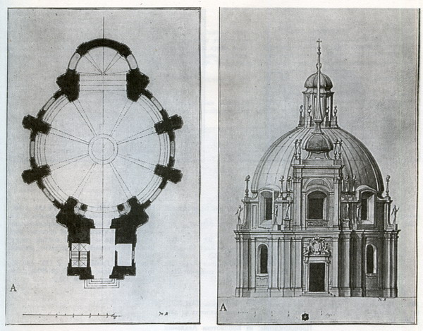 Соборна церква: план і фасад церкви